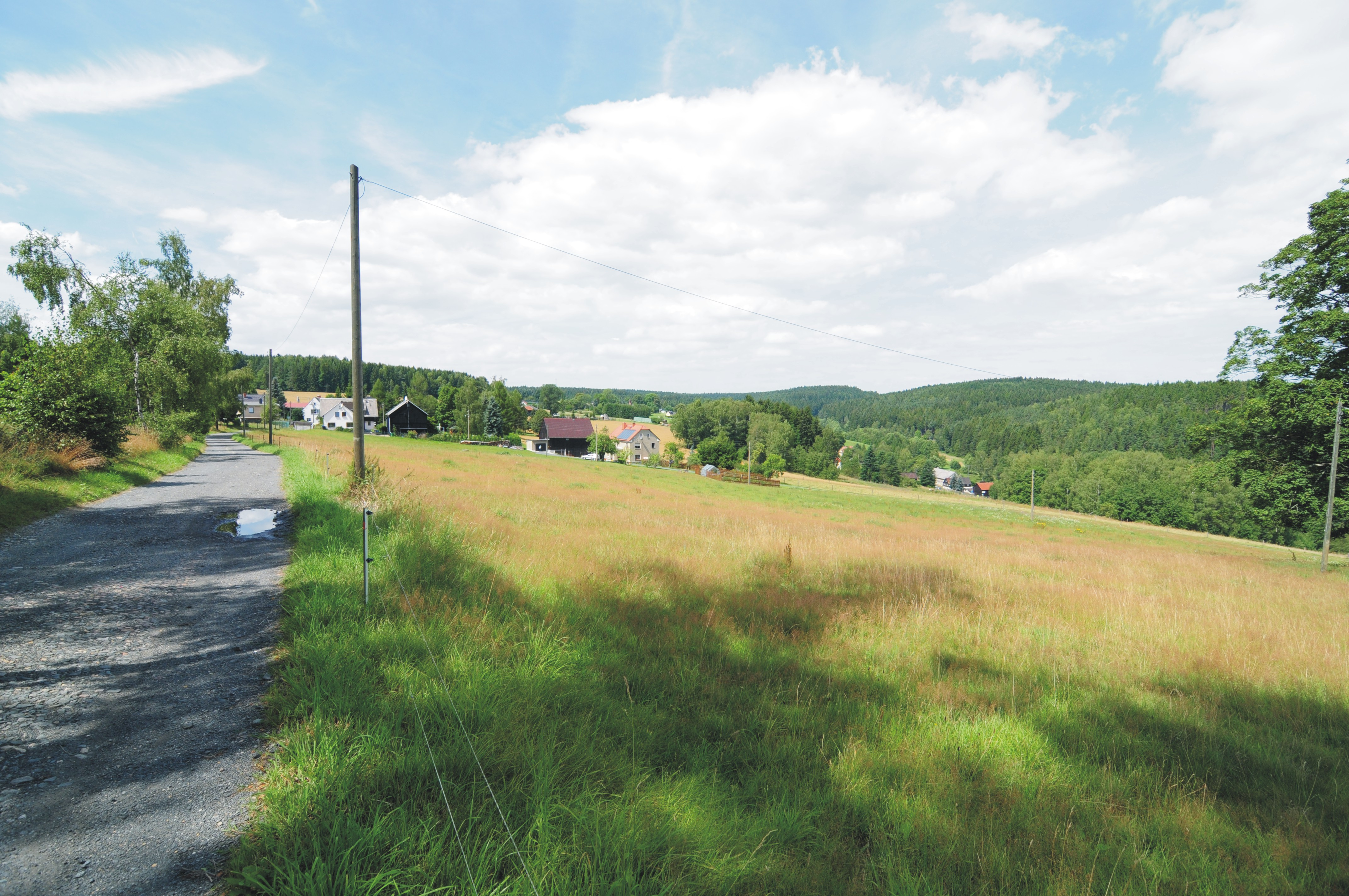 Häuser in Untergettengrün (Adorf, Sachsen, Deutschland)